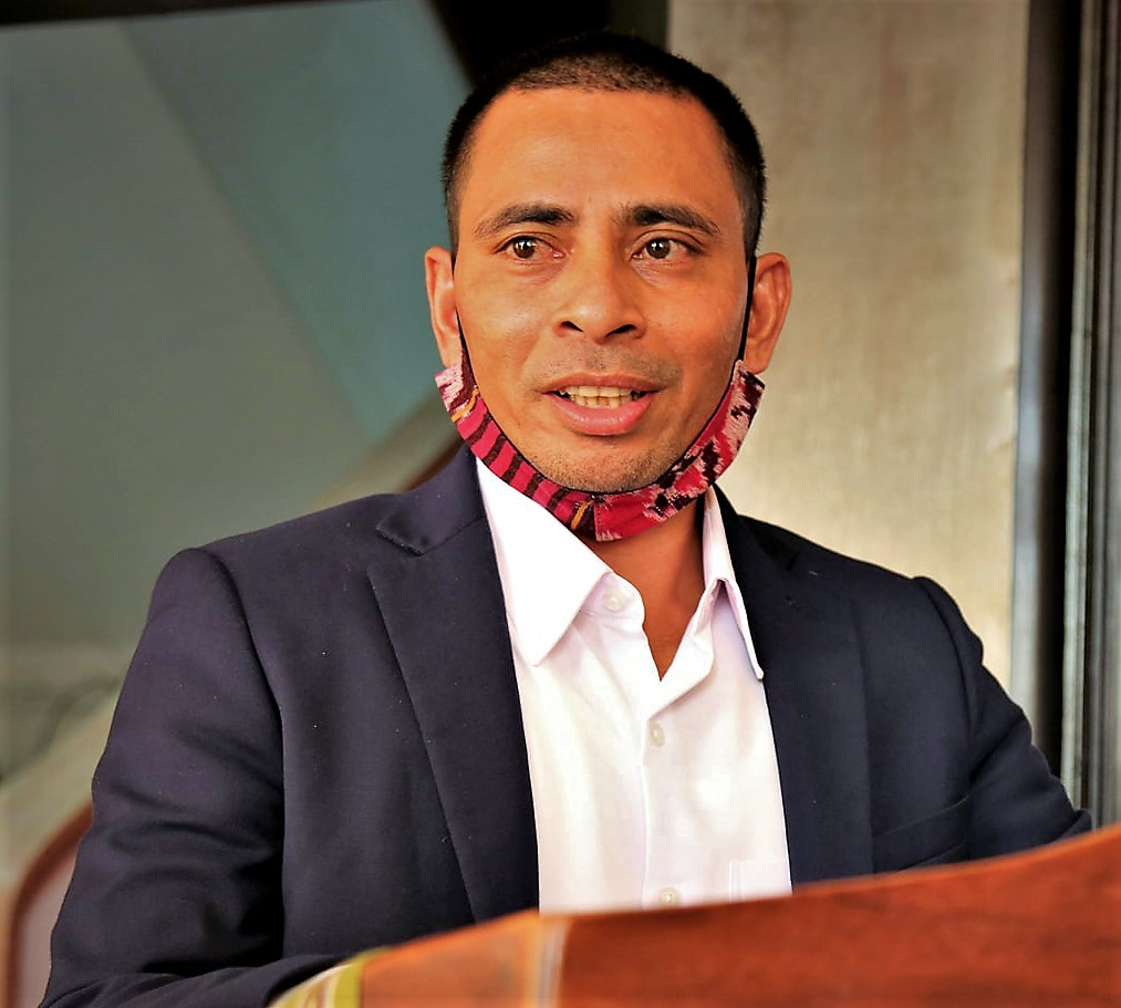 Antonino Armindo